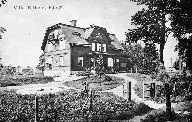 Villa Elfhem, uppförd 1904. Även kallad "Doktorsvillan". Byggnaden är ett av de första bostadshusen som uppfördes i Älvsjö.